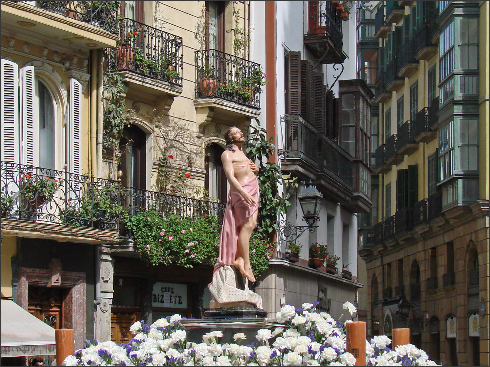 La semaine sainte à Bilbao, sur la place de la cathédrale. Procession dans la vieille ville de Bilbao, le dimanche de Pâques, pour commémorer la Résurrection du Christ.